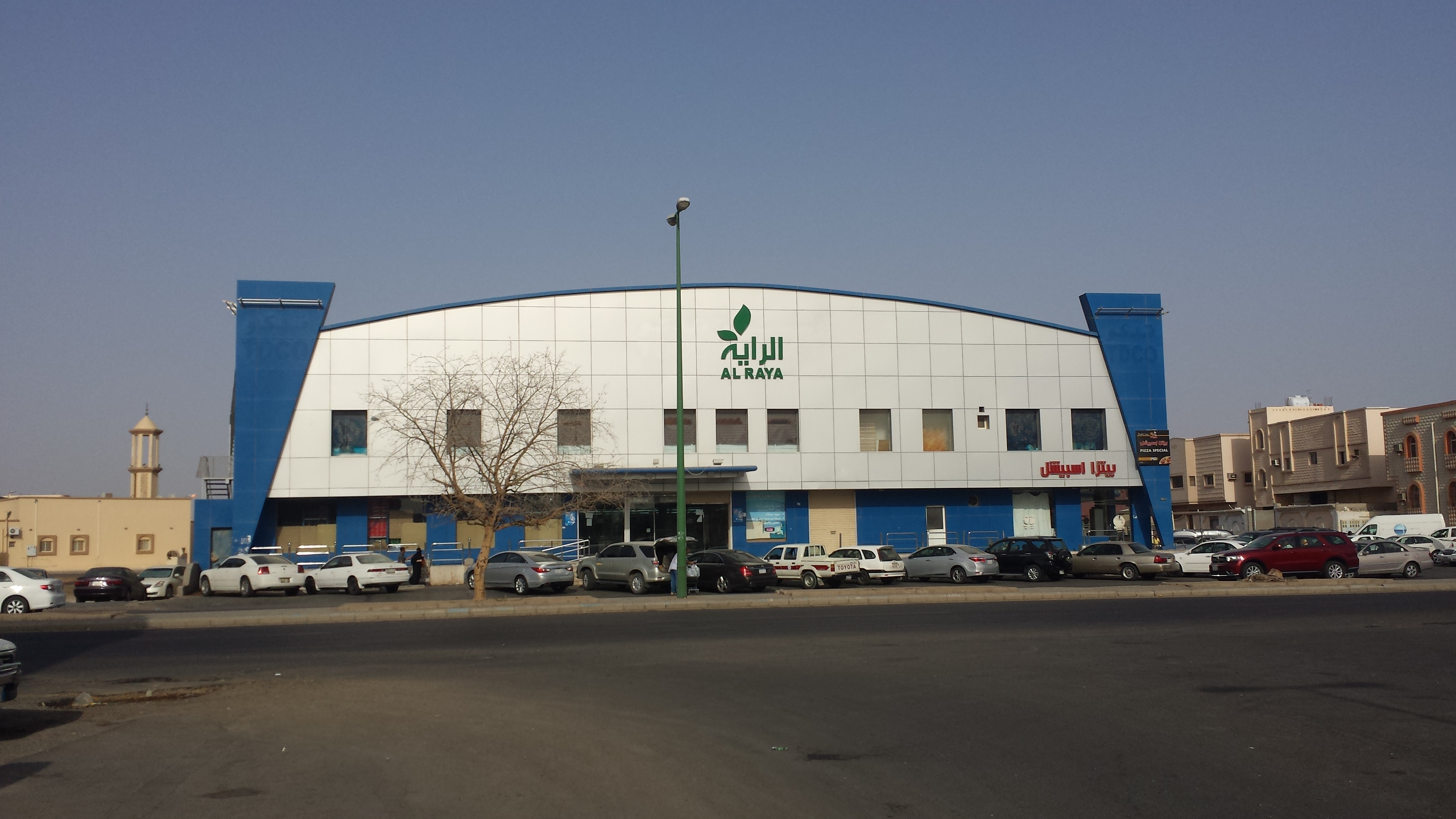 Al RAYA supermarket